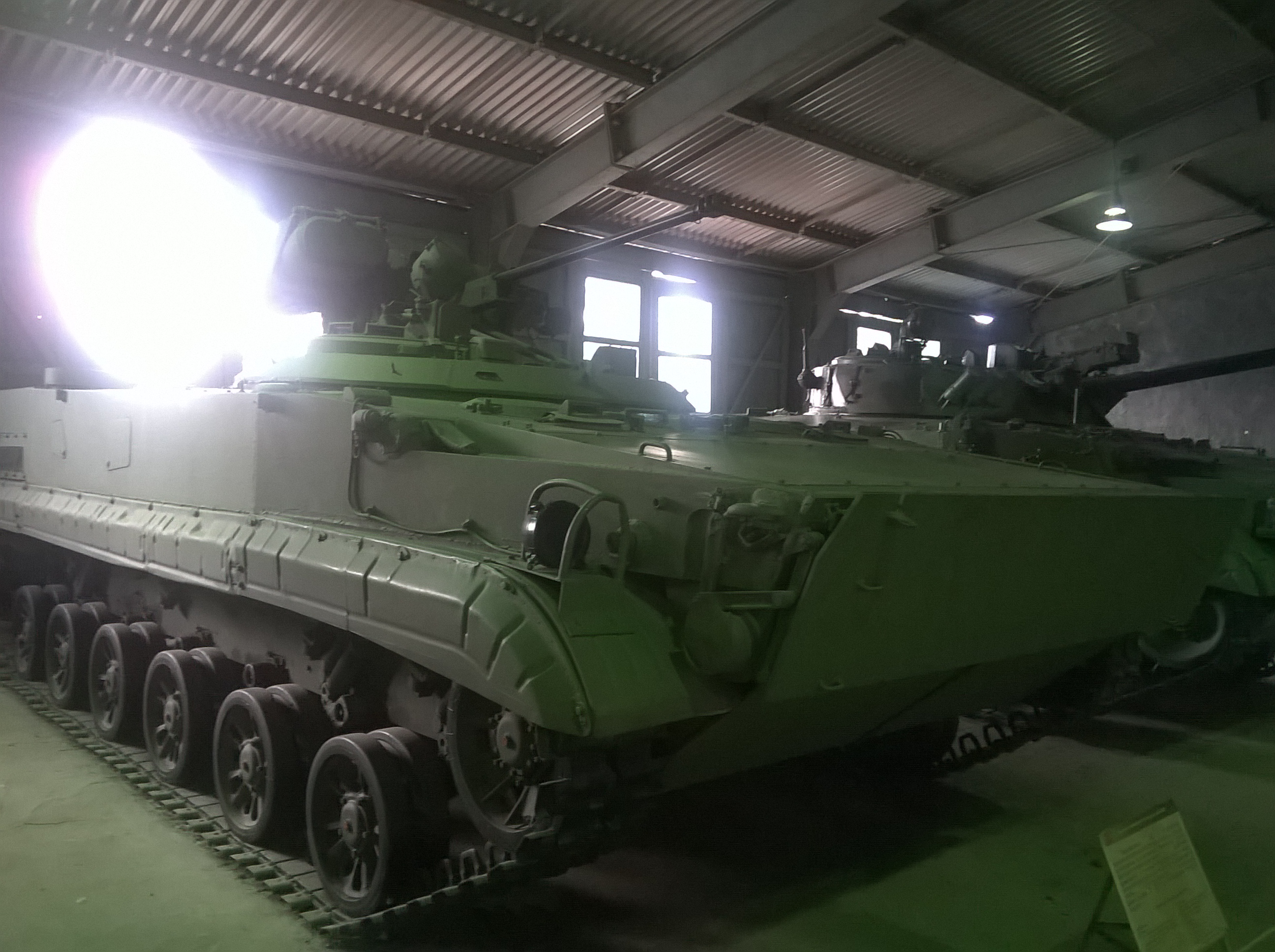 Объект 688 в Бронетанковом музее Кубинки.